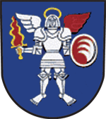 Znak obce Lešná